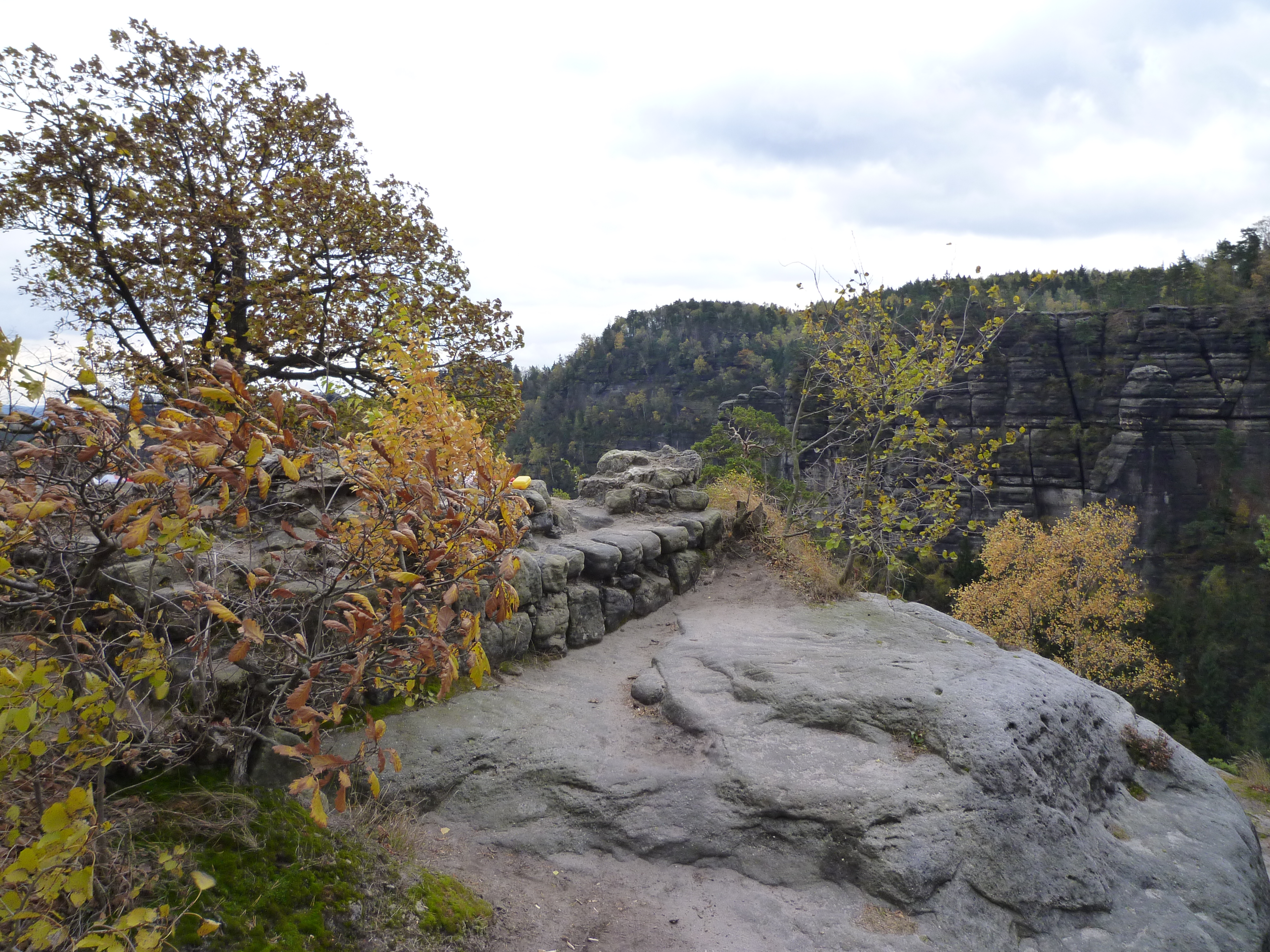 Fundamentreste des Wohnturms auf dem Winterstein